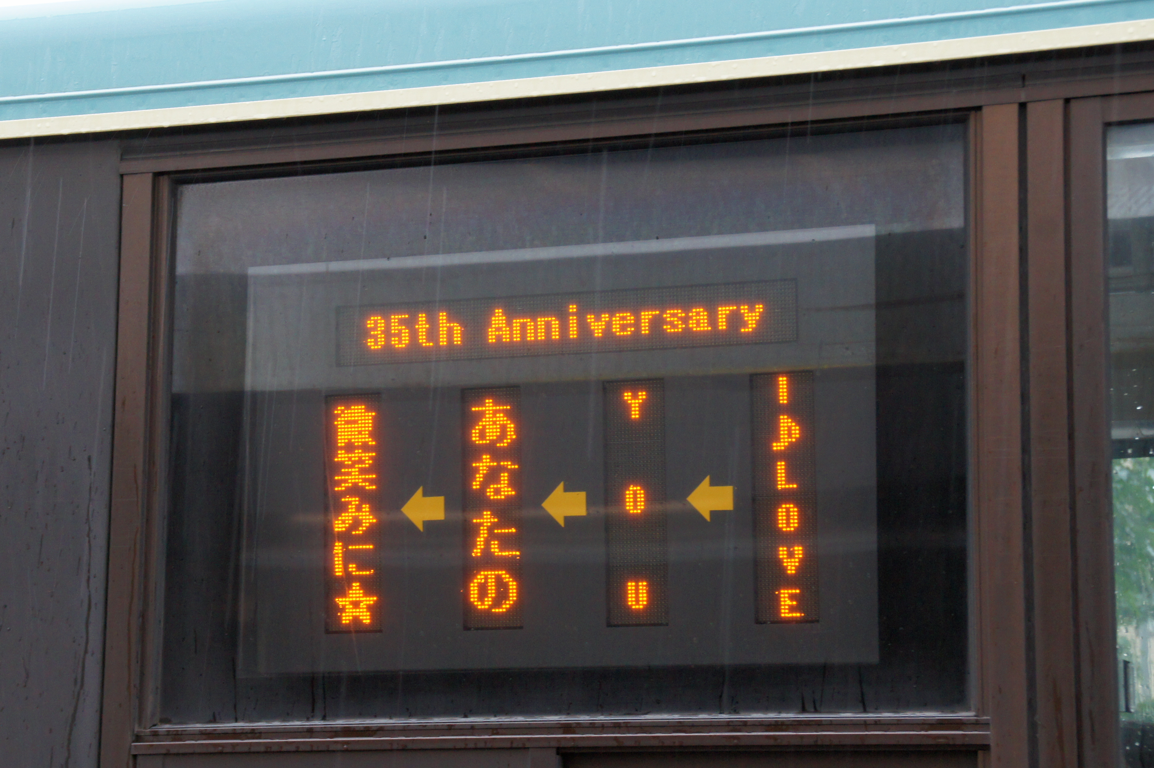 松田聖子35周年コンサートでの表示